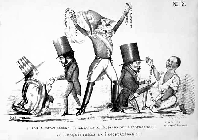 Caricatura en la que el presidente Ramón Castilla aparece como redentor de la población indígena y de los esclavos negros. Leyenda: ¡¡Rompe estas cadenas!! ¡¡Levanta al indígena de la postración!! ¡¡Conquistemos la inmortalidad!! Descripción: Los mentores de la abolición del tributo indígena y de la esclavitud. El presidente Ramón Castilla, a su izquierda Pedro Gálvez y a la derecha Manuel Toribio Ureta.